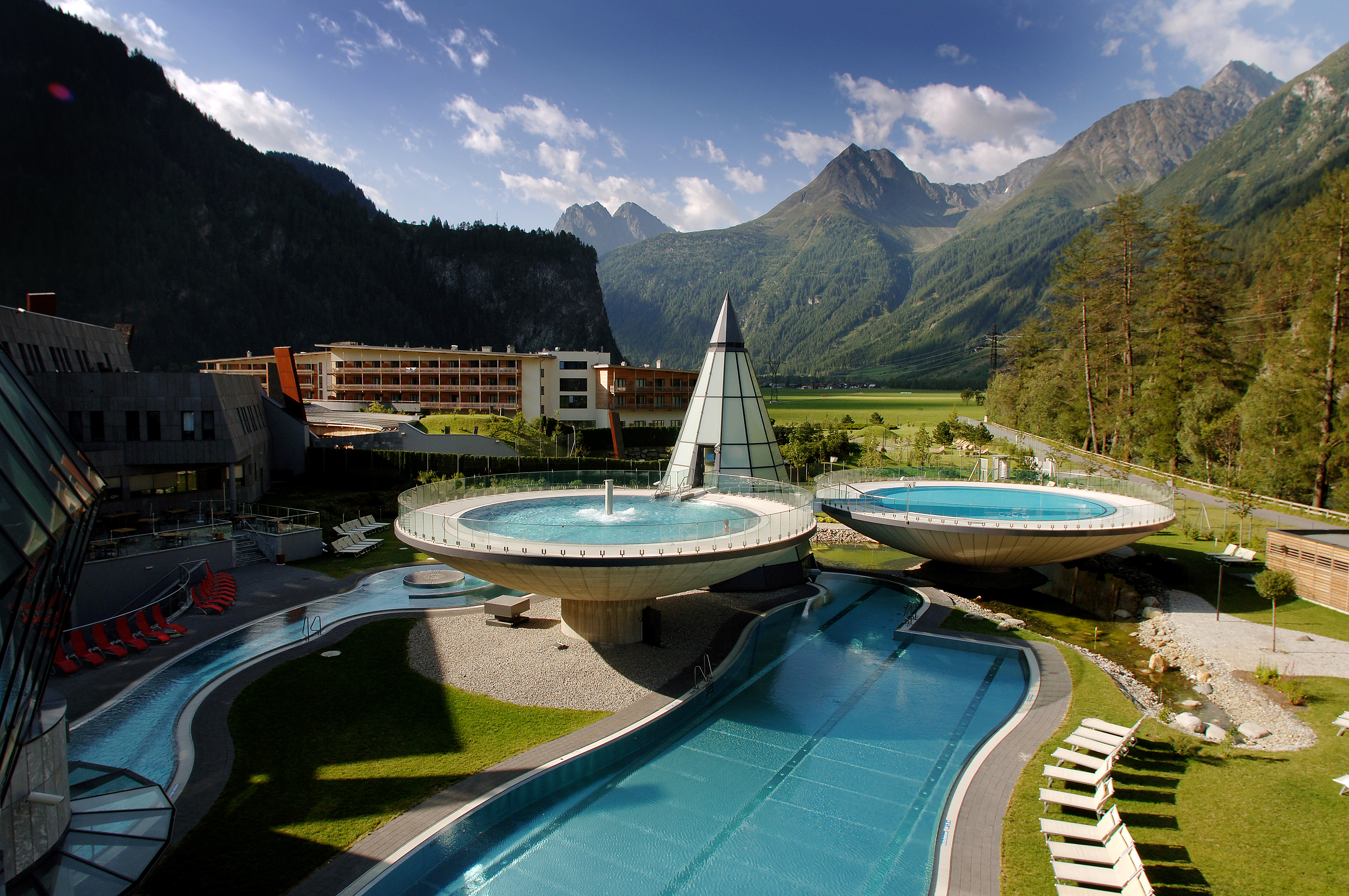 Aussenansicht des Wellnesshotels AQUA DOME in Längenfeld, Tirol